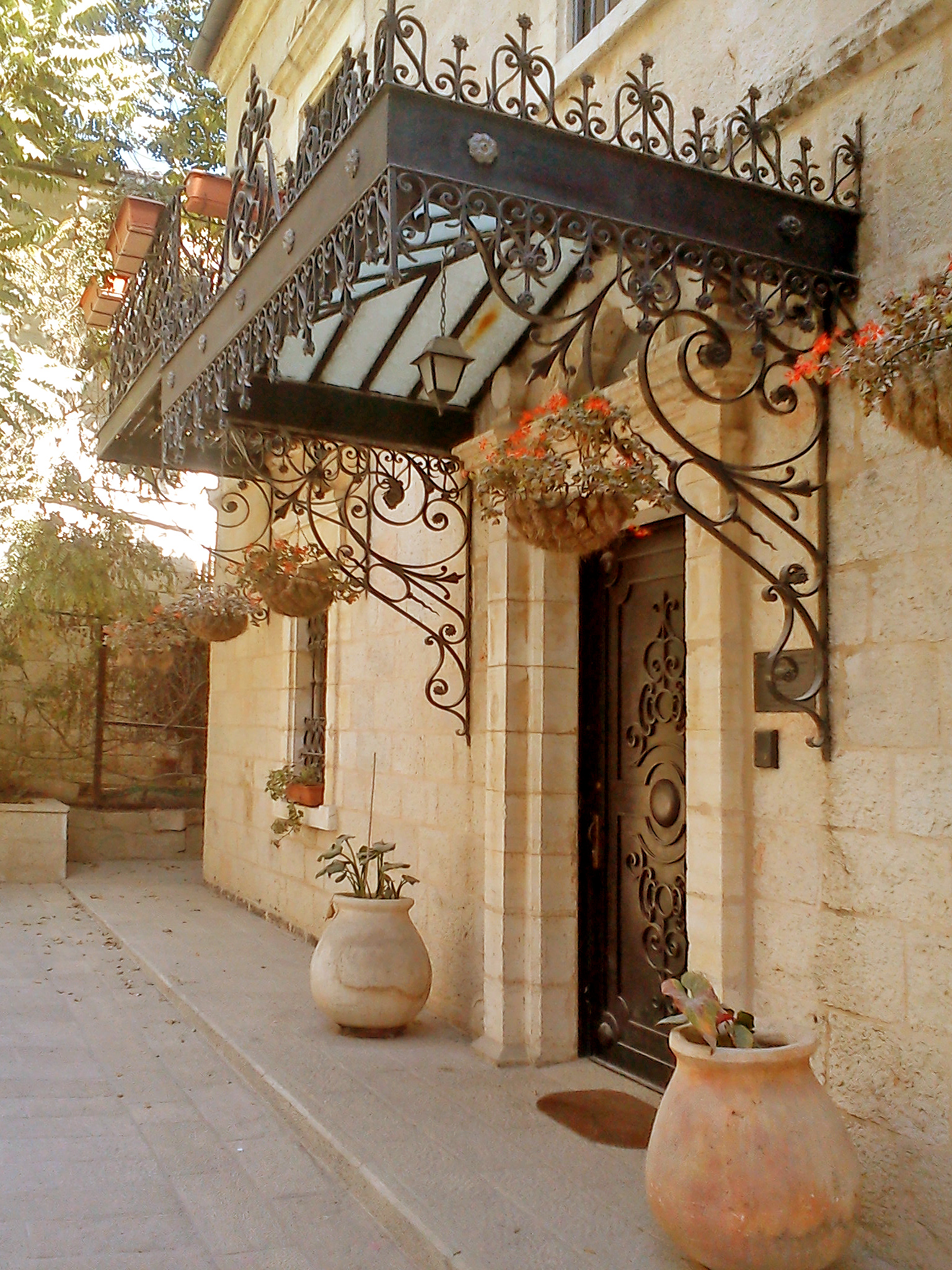 בית משכית ברחוב הרב קוק בירושלים, שימש בעבר כבית הקונסול האיטלקי. בנוי בסגנון הרנסאנס. החלונות כוללים סורגים נאים ומקושטים בראשם בעיטור על אקאנתוס. דלתות העץ מקולפות בקישוטים.